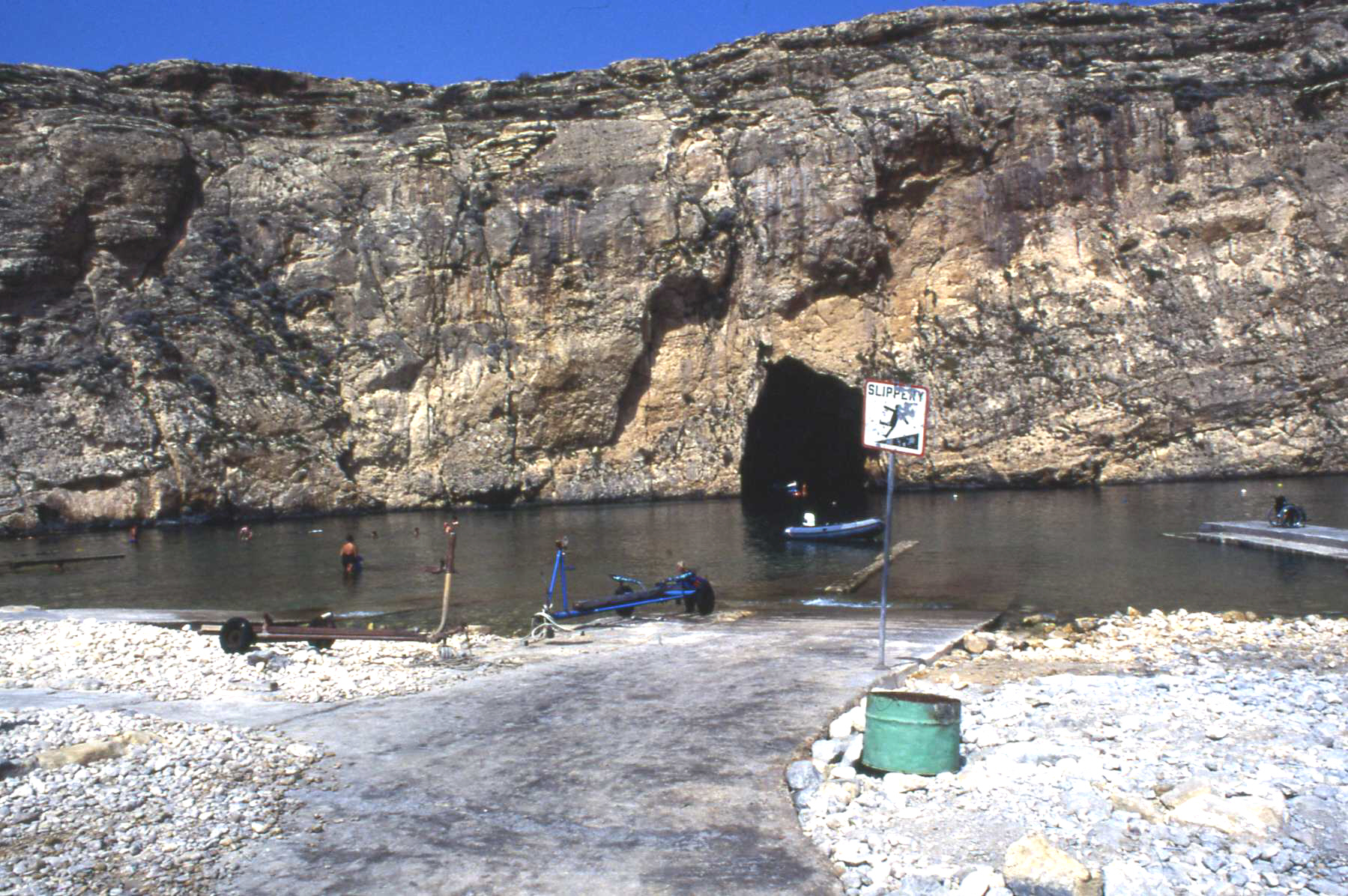 Inlandsee